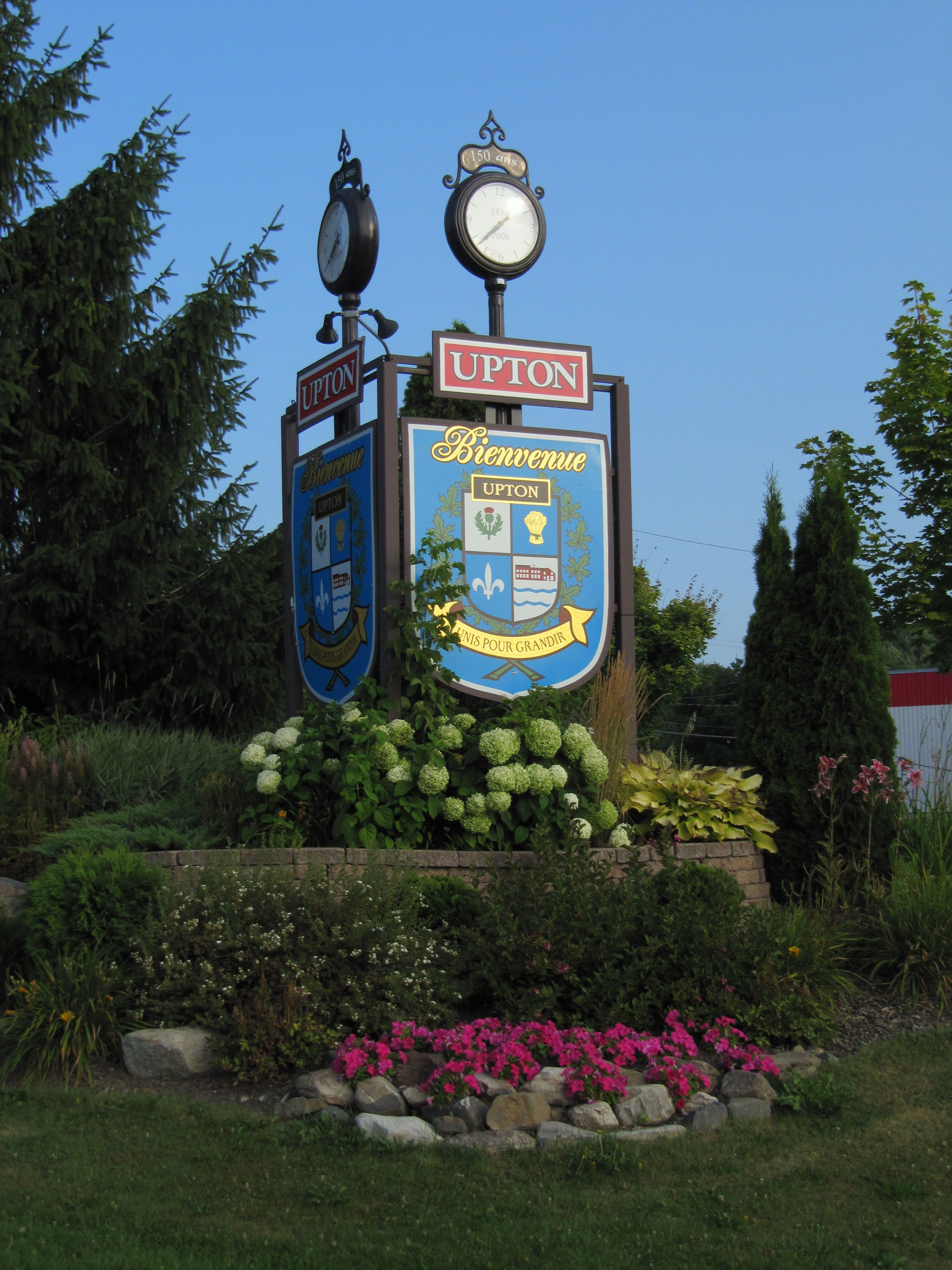 Blason d'Upton (Québec) - Unis pour grandir - 150e anniversaire (1856-2006)